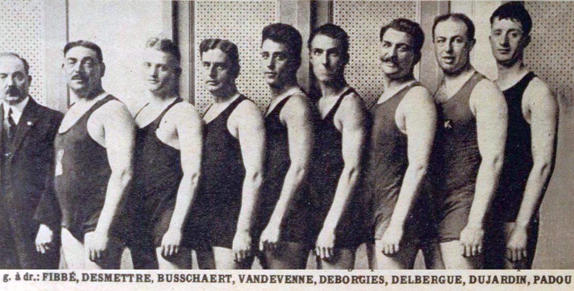 Les Enfants de Neptune de Toucoing champions de France de water-polo en 1923.